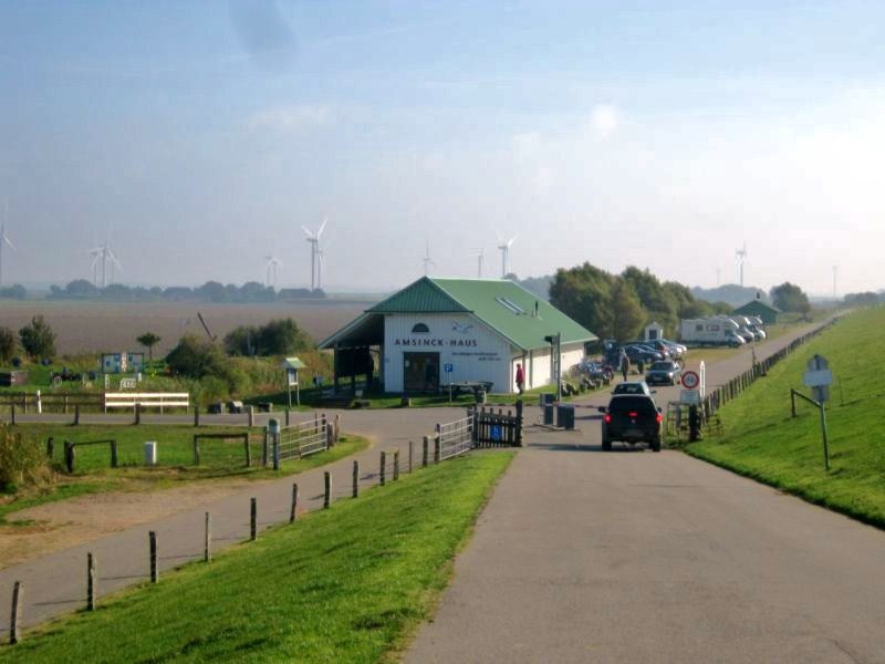 Hamburger Hallig, Reußenköge, Kreis Nordfriesland. Amsinck-Haus auf dem Festland, Information zum Nationalpark, Verleih von Fahrrädern, Parkplatz und Ticketverkauf für die Zufahrt zur Hallig mit dem PKW. An der Straße die Schranken, die die Zufahrt zur Hallig begrenzen.